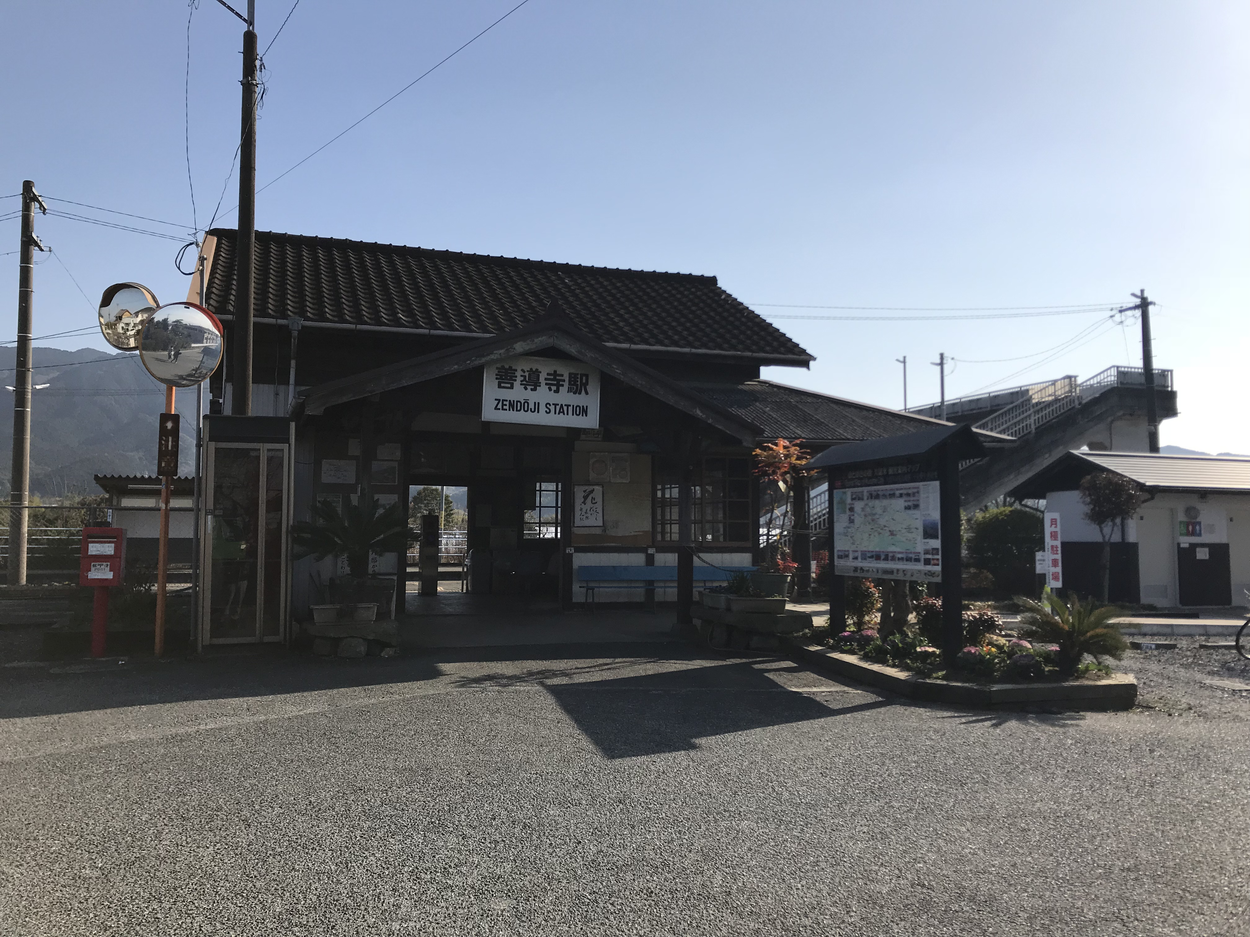 善導寺駅の駅舎